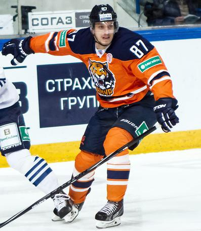 Нападающий хабаровского «Амура» Марцел Гашчак во время матча чемпионата КХЛ против «Адмирала» 24 ноября 2014 года.